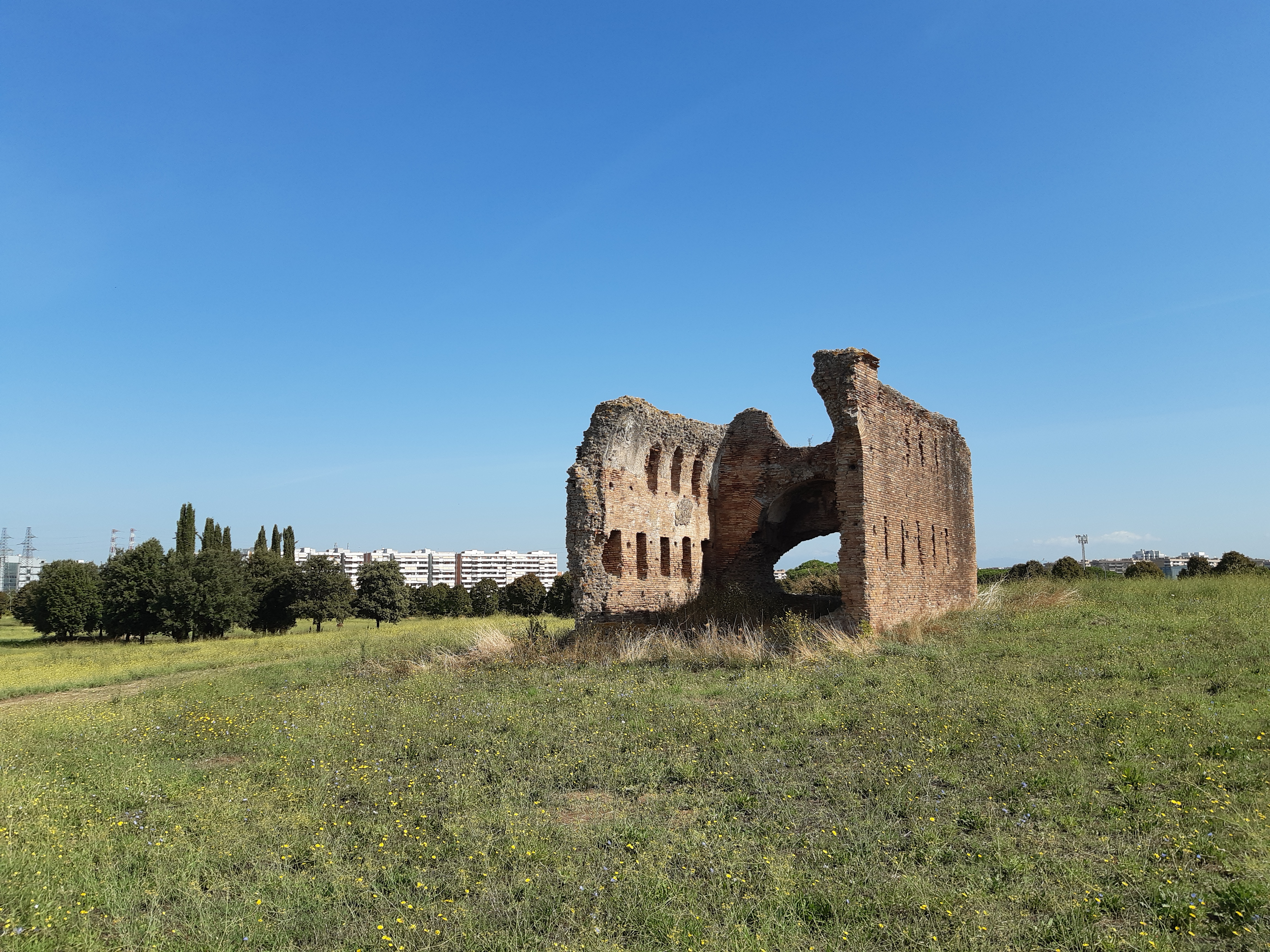 Villa dei Sette Bassi This is a photo of a monument which is part of cultural heritage of Italy.